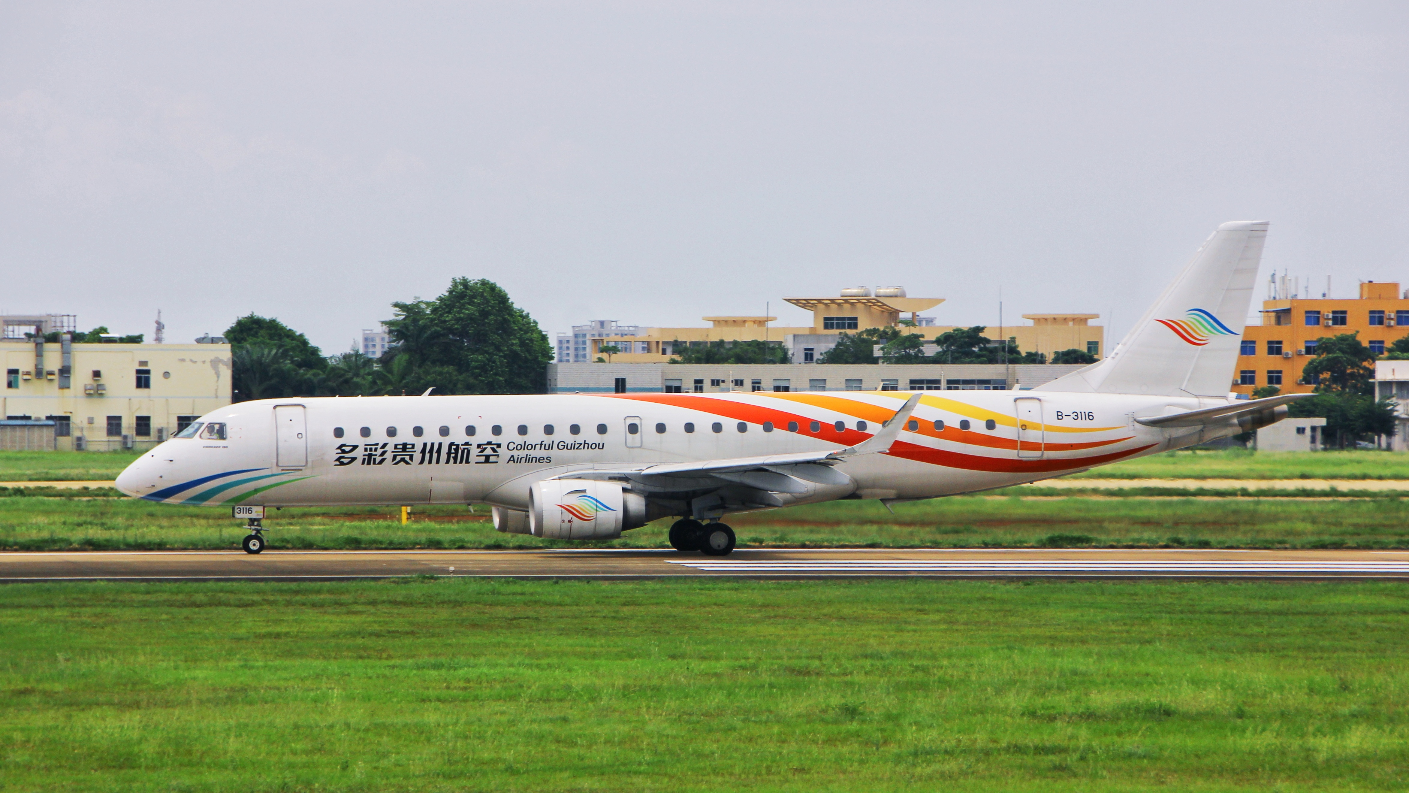 中文（中国大陆）: 多彩贵州航空巴航工ERJ-190（B-3116）在海口美兰机场